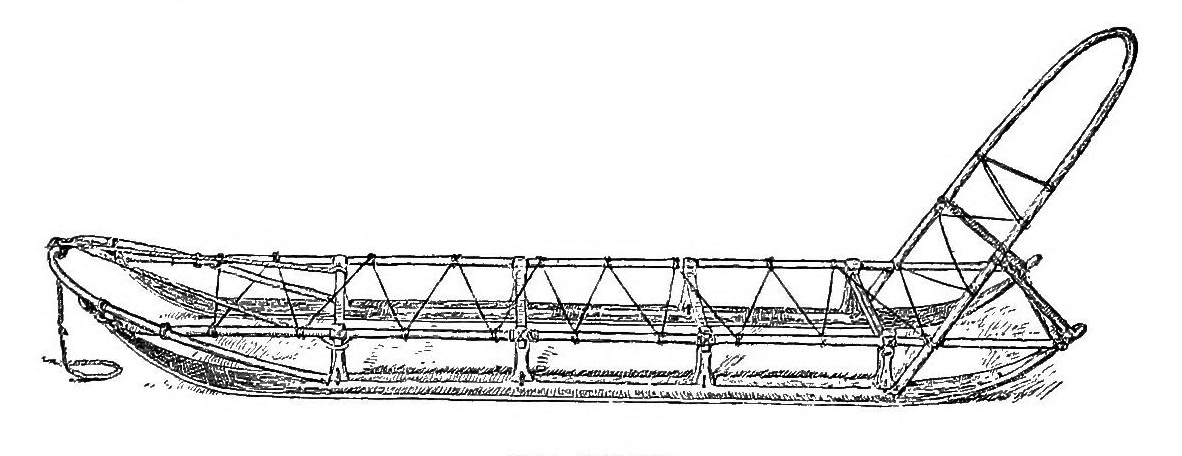 Сани, применявшиеся во время Гренландской экспедиции Нансена.